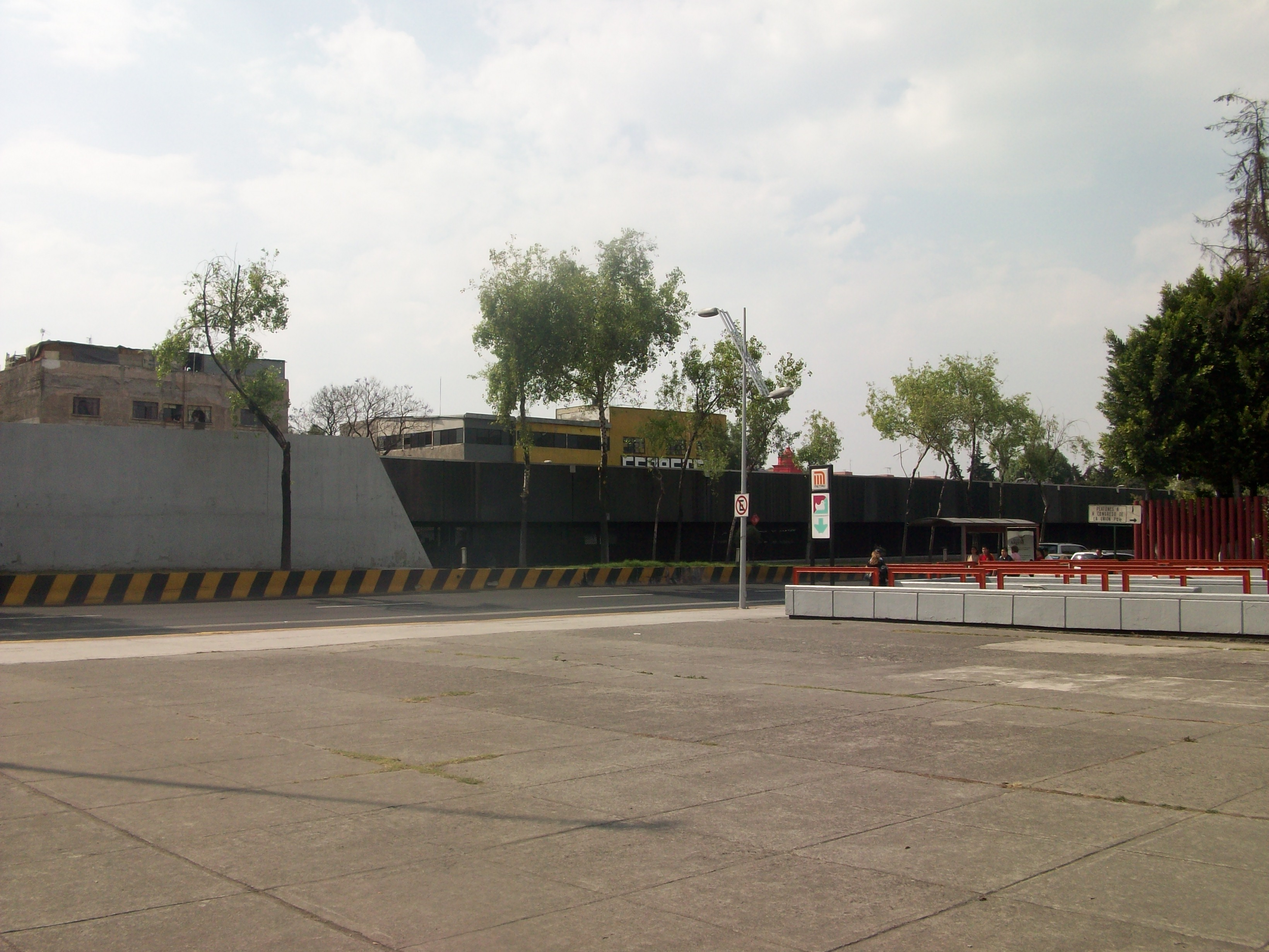 Edificio de andenes de la estación Candelaria de la linea 4